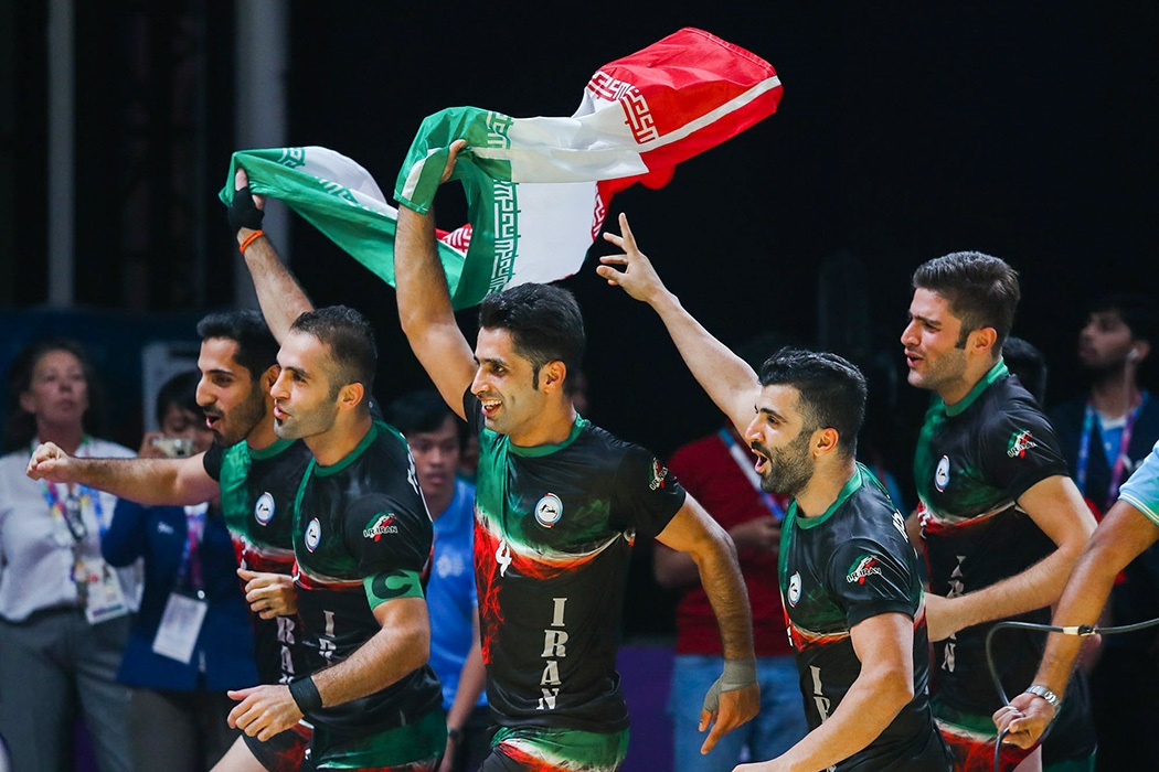 تیم ملی کبدی مردان ایران در بازیهای آسیایی جاکارتا ۲۰۱۸